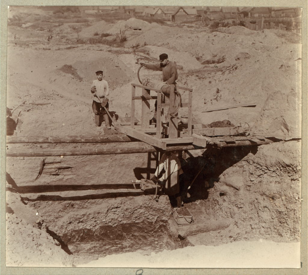 TITLE: Dobyvanīe zolotonosnago peska. [Berezovski] TITLE TRANSLATION: Recovery of gold-bearing sand. [Berezovski]